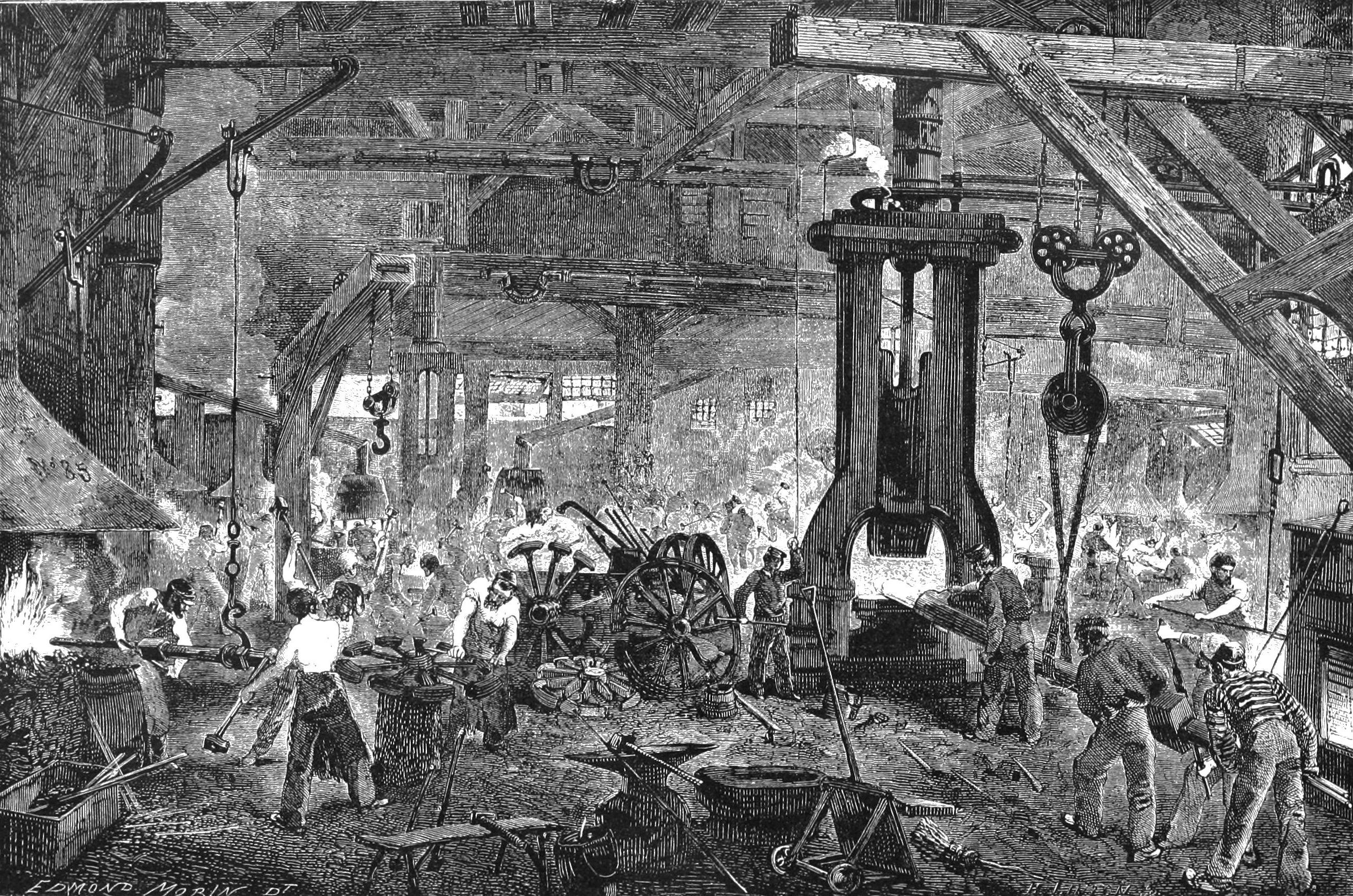 A modern forge